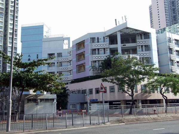 元州邨元康樓